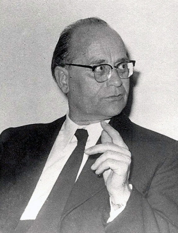 Prof. Dr. Nikolaus Monzel, vermutlich um 1960 Foto ohne Vermerk des Urhebers aus dem Nachlass meines Vaters Erich Wewel (†1974), das ihm von Prof. Dr. Nikolaus Monzel zur Veröffentlichung freigegeben wurde. Handschriftlich ist auf der Rückseite vermerkt: "ein technisch schlechtes, aber sehr getreues Bild aus den letzten Lebensjahren"